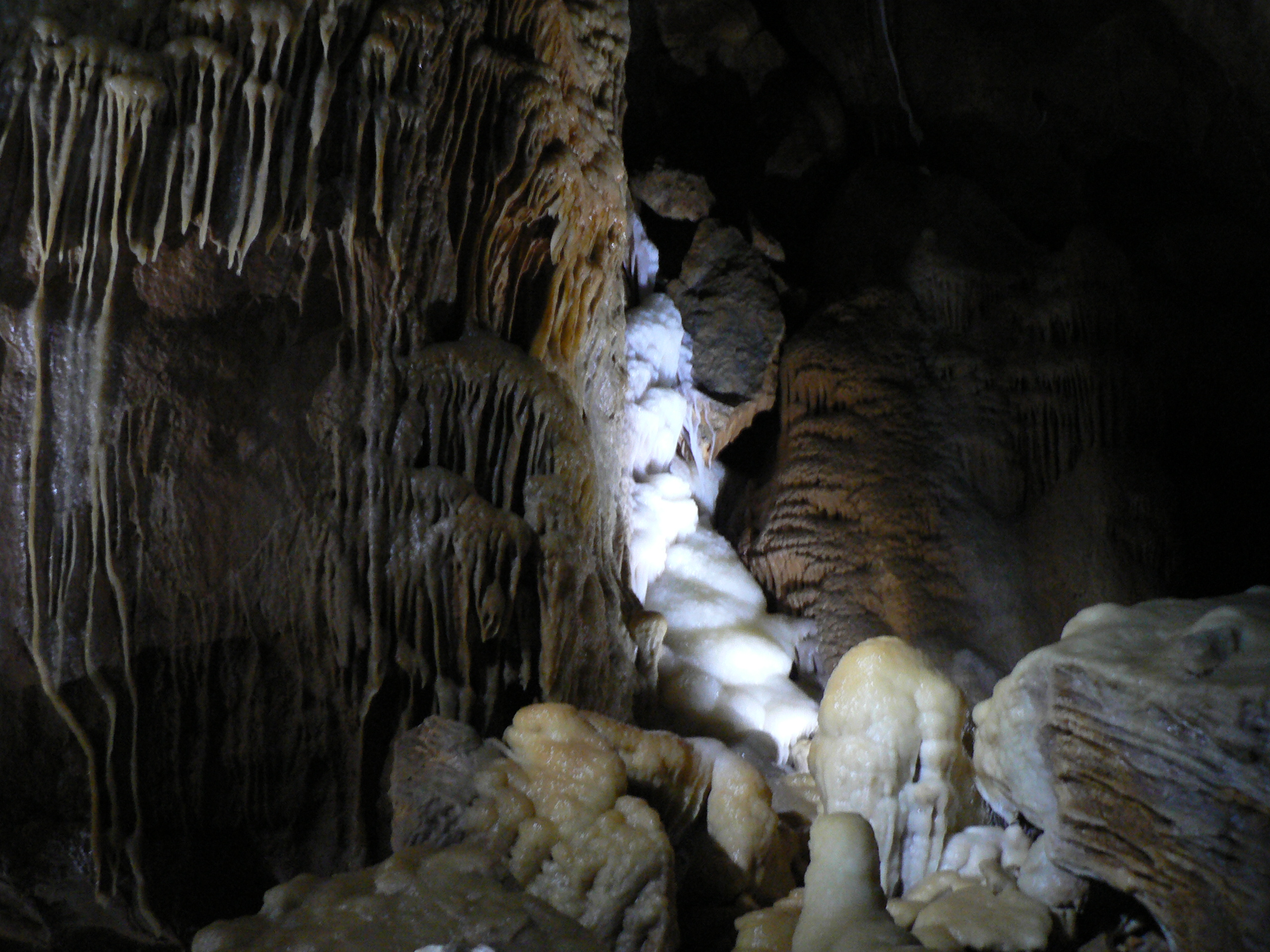 Herbstlabyrinth